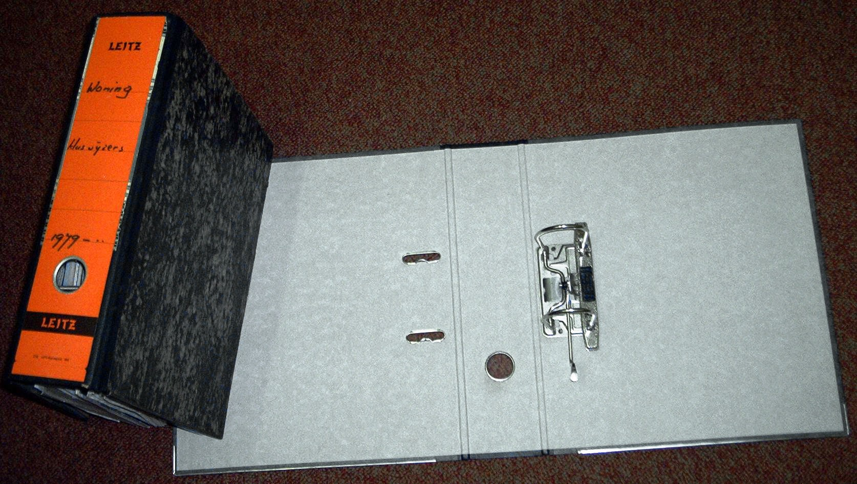 zelf gemaakte foto voor het publiek domein. Martink.